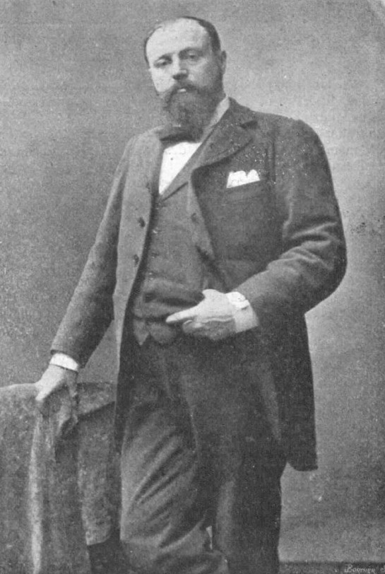 "Alexandre Hepp, chroniqueur et critique littéraire, rédacteur en chef de la Revue des rhumatisants, chevalier de la Légion d'honneur".